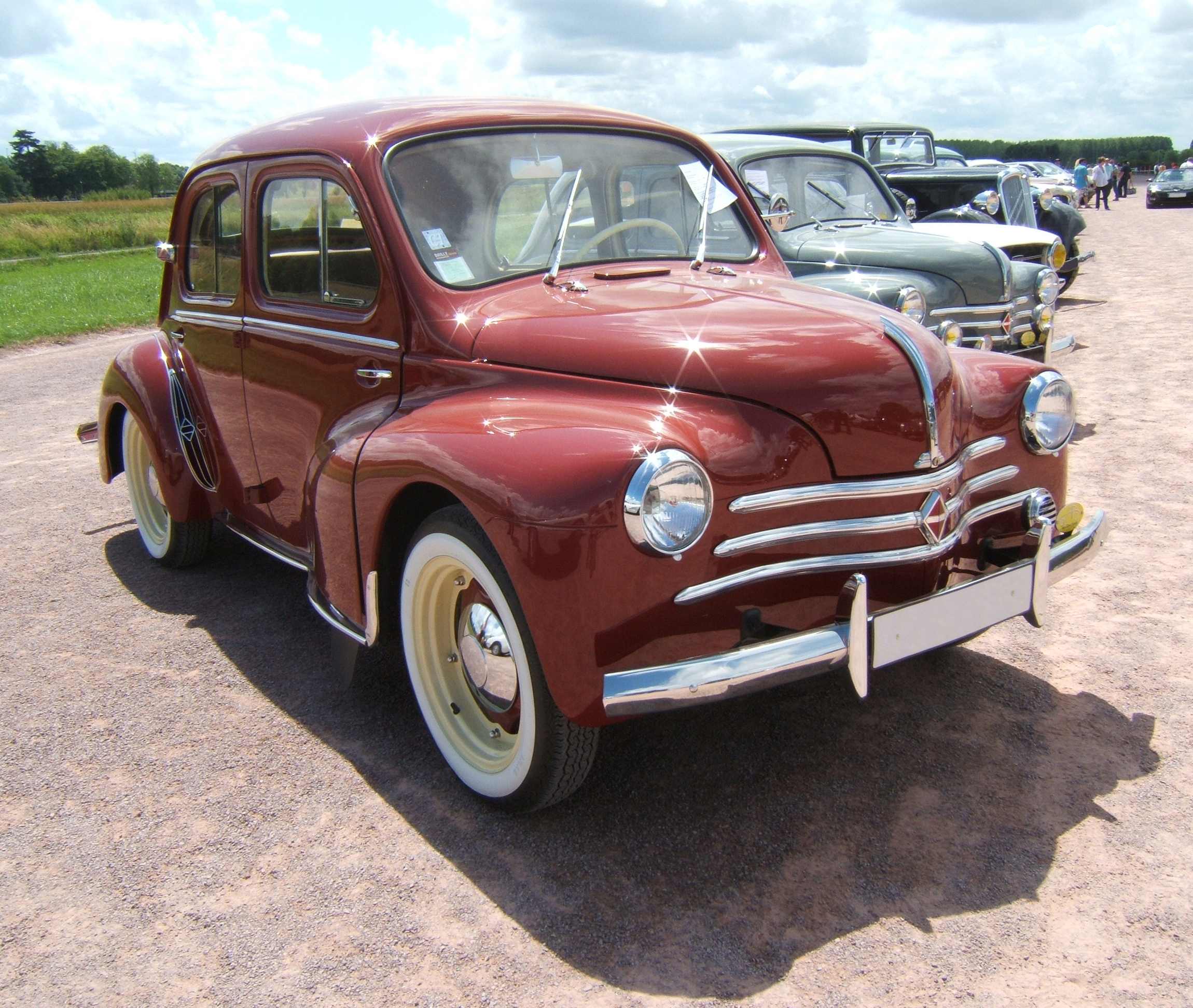 Renault 4CV